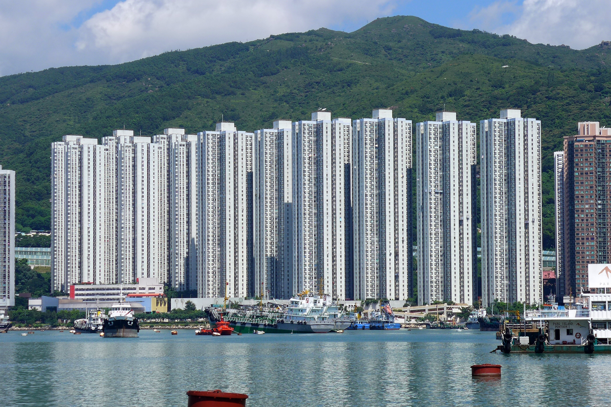 Belvedere Garden, Tsuen Wan